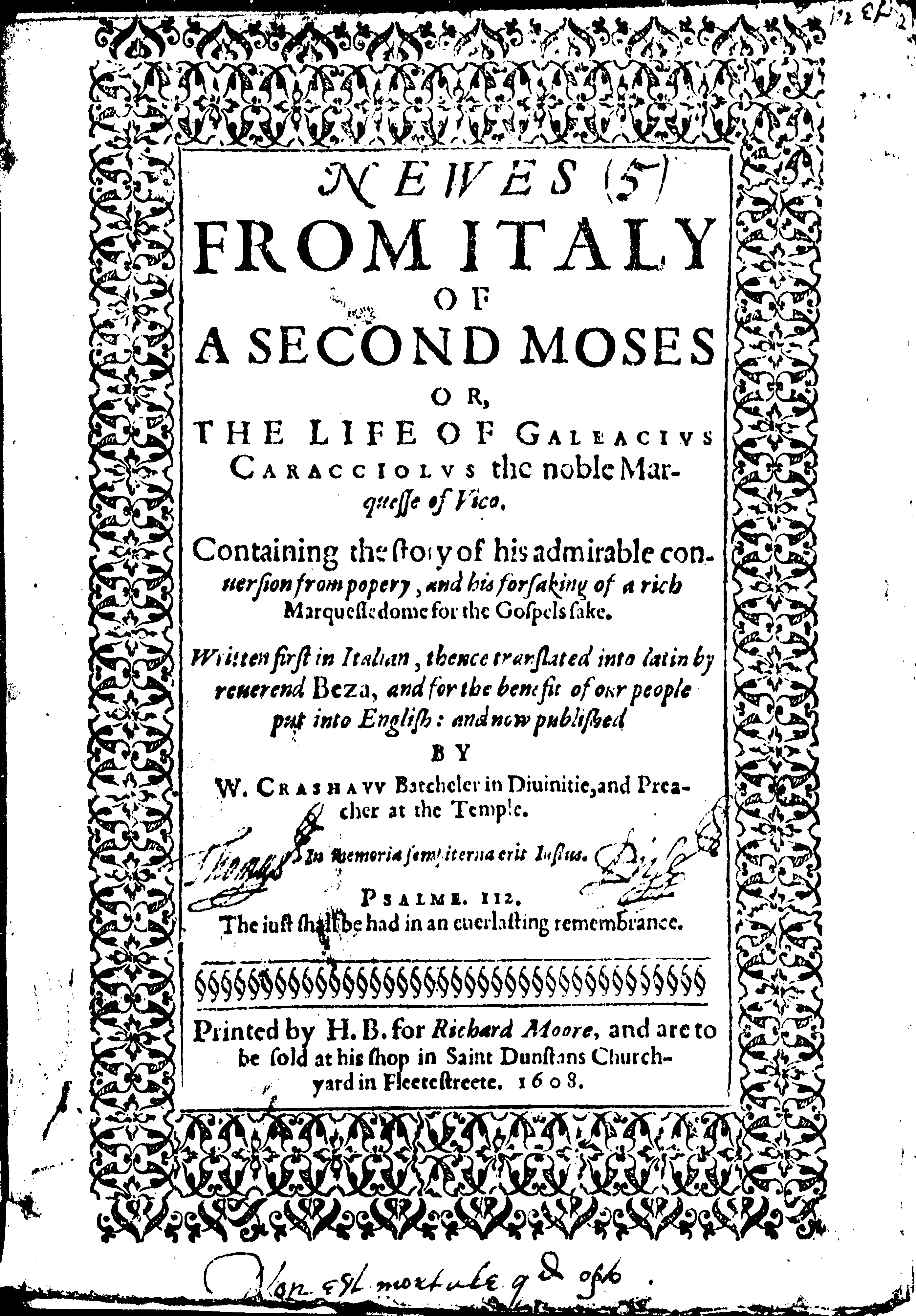 La vita di Galeazzo Caracciolo (1587), traduzione inglese di William Crashaw (1572-1626), 1608